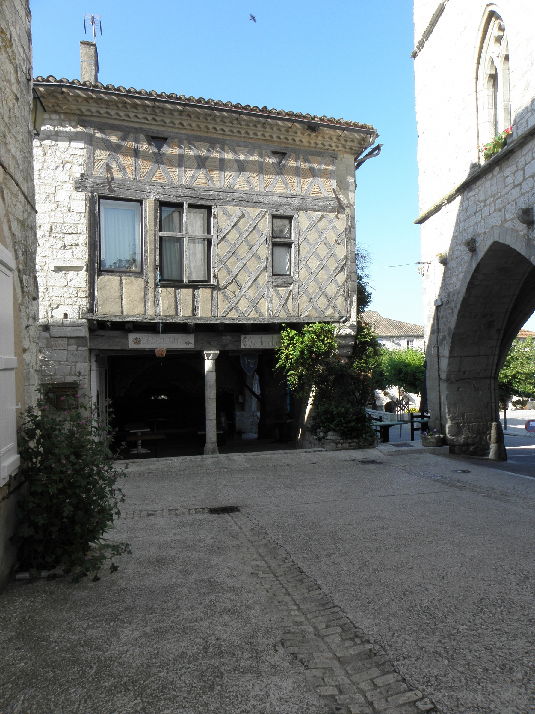 Maison à colombages à Monflanquin (47).